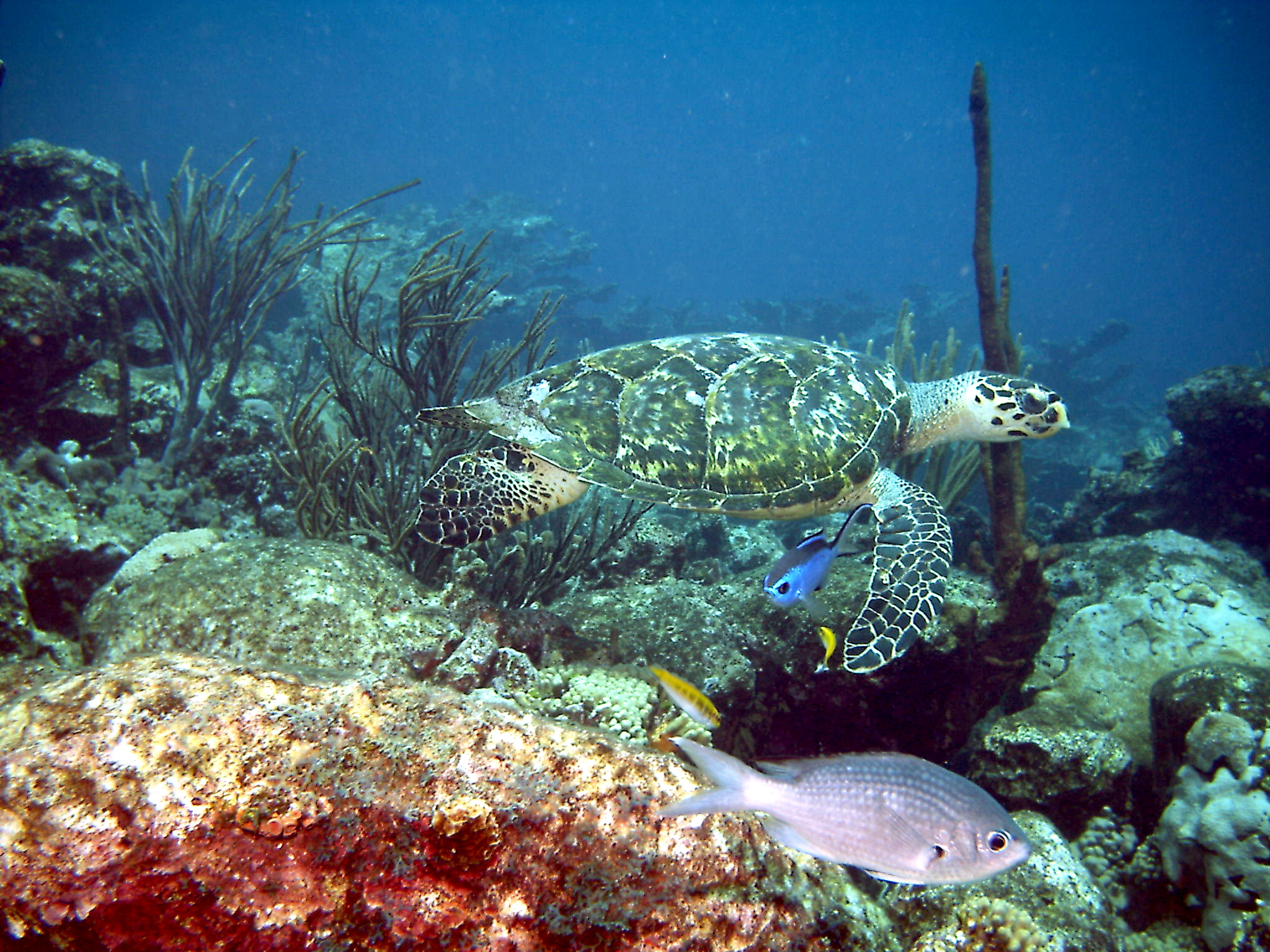 Autor: PSE Tortuga Carey Eretmochelys imbriocota Localización: Venezuela, Estado Falcón, Tucacas, Parque Nacional Morrocoy, Area Especial, Cayo Norte, Zona de Buceo de El Jardín, profundidad 15 m. Enero 2004